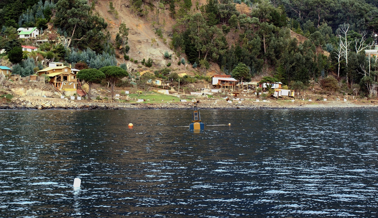 Núdzová bója vraku v plavebnej dráhe pri pobreží